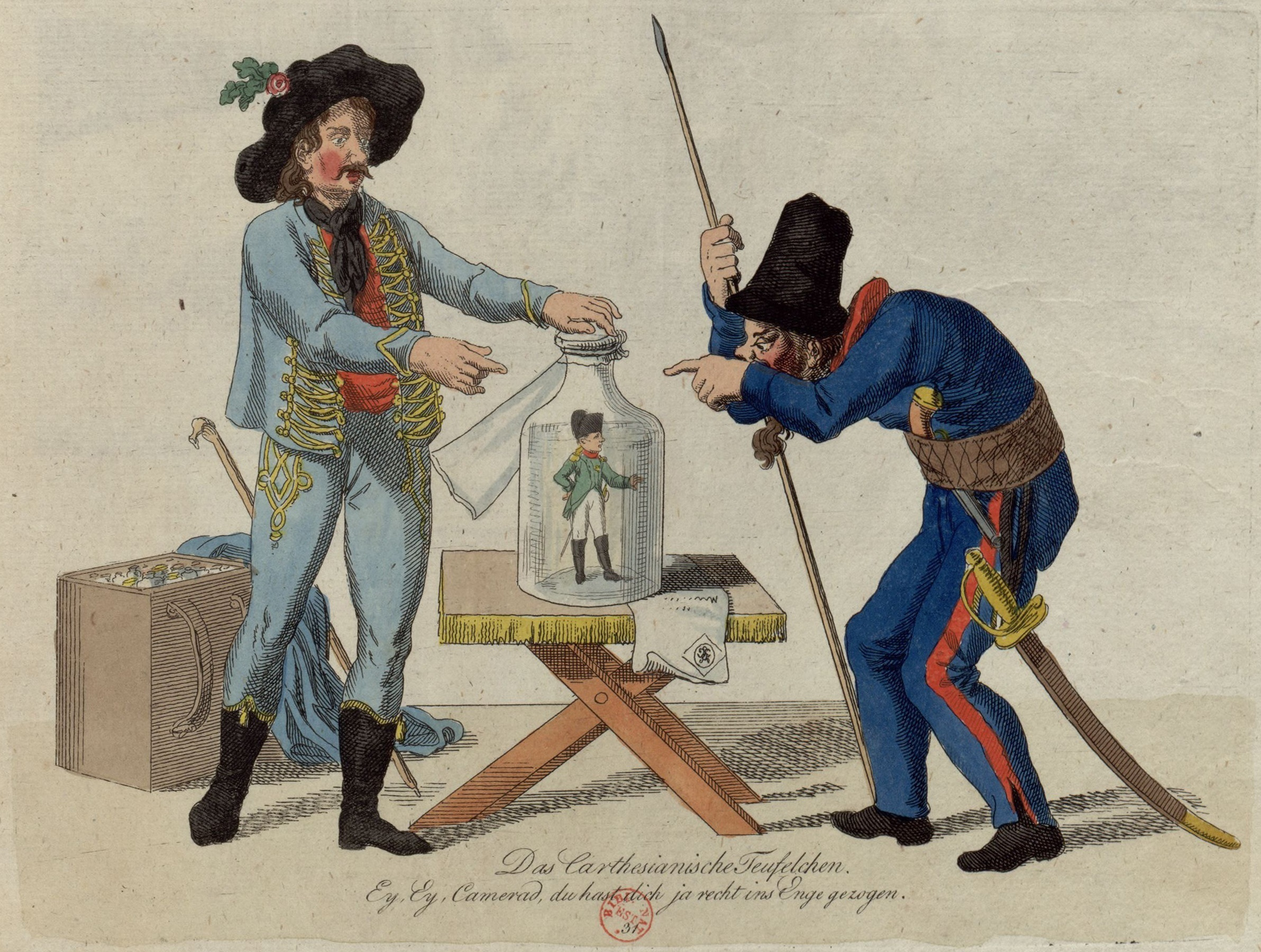 C'est Napoléon, qui dans le bocal fait l'office du diable cartésien, et c'est un Autrichien qui le fait plonger devant un cosaque russe qui s'esclaffe : «Ey, Ey, Camerad, du hast dich ja recht ins Enge gezogen.»